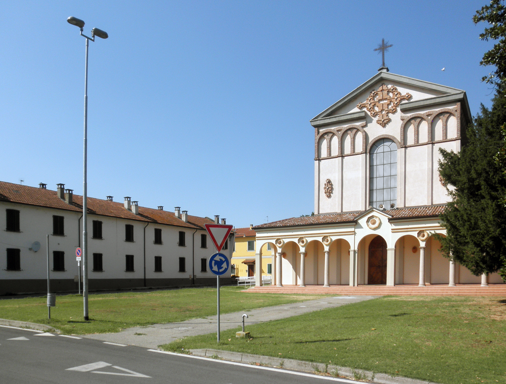 La piazza di Mirabello, fraz. di Senna Lodigiana